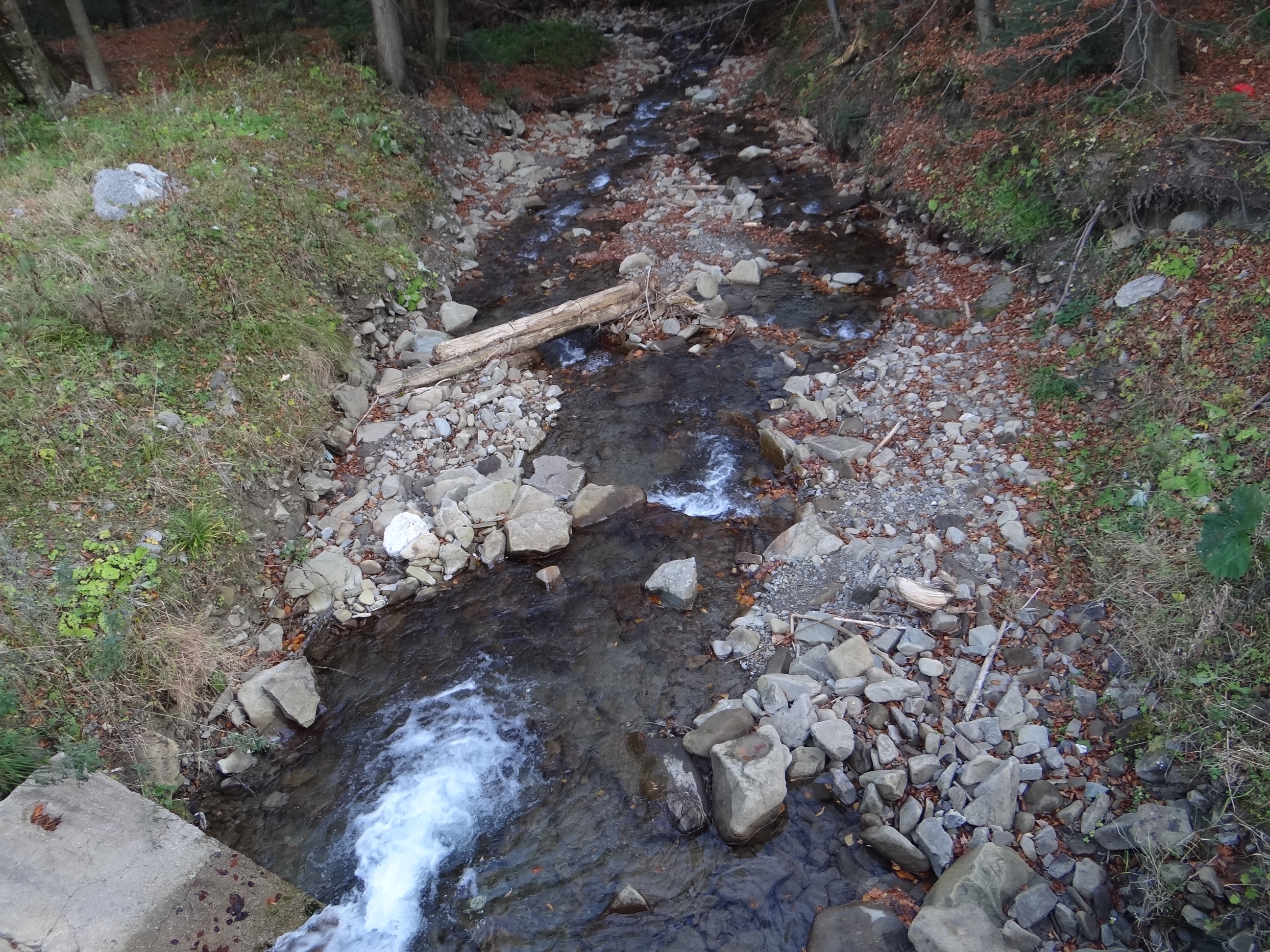 Potok Zakulawka